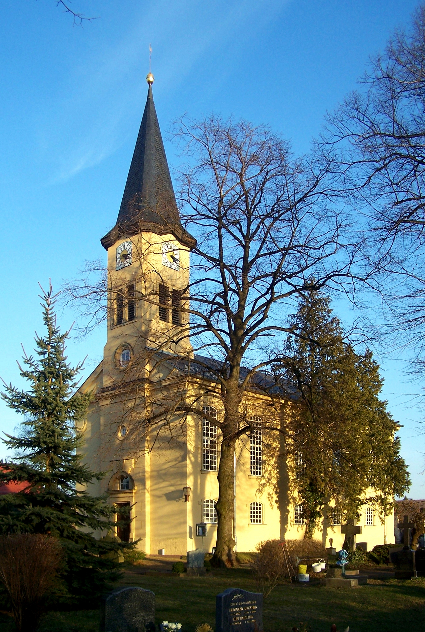 Jakobuskirche Niederau, Landkreis Meißen